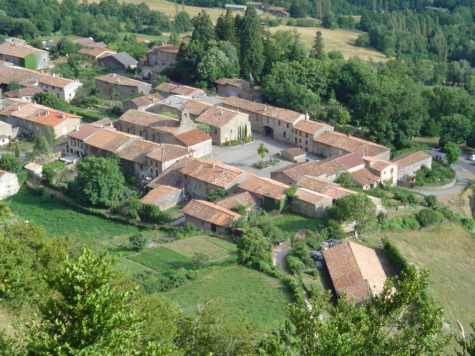 Roquefixade (France,09)